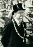 Opening van de Willem III-kazerne. Op de foto burgemeester C.G.C. Quarles van Ufford